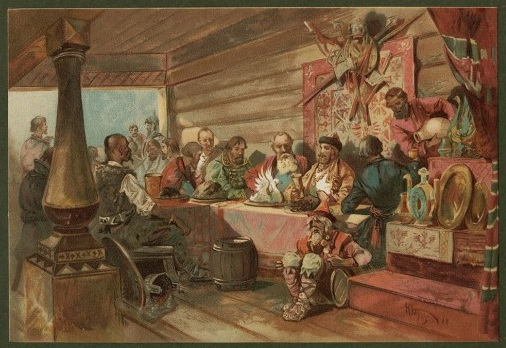 Пир у князя Владимира